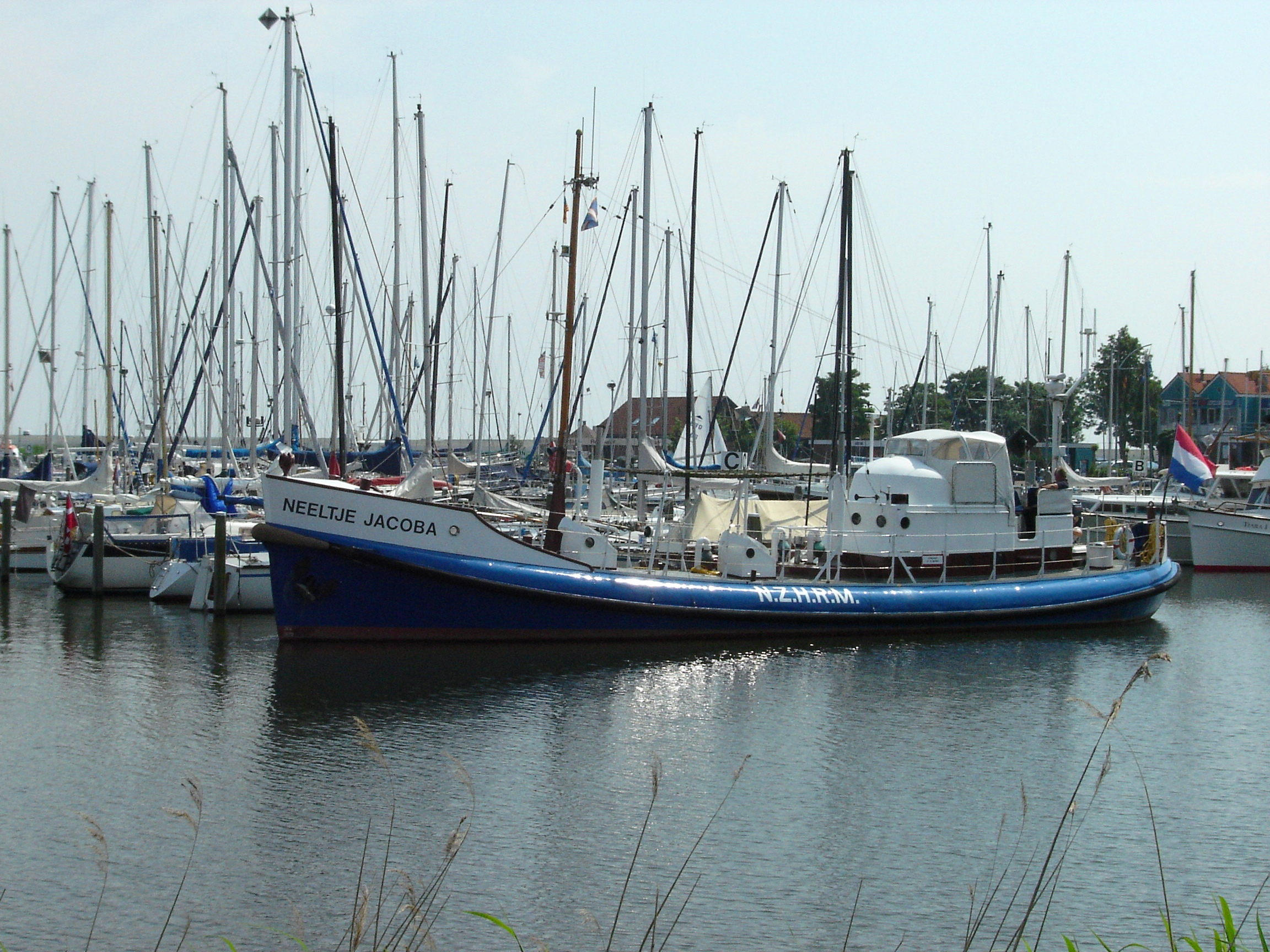 De Neeltje Jacoba in de haven van Enkhuizen. Former Dutch lifeboat Neetje Jacoba